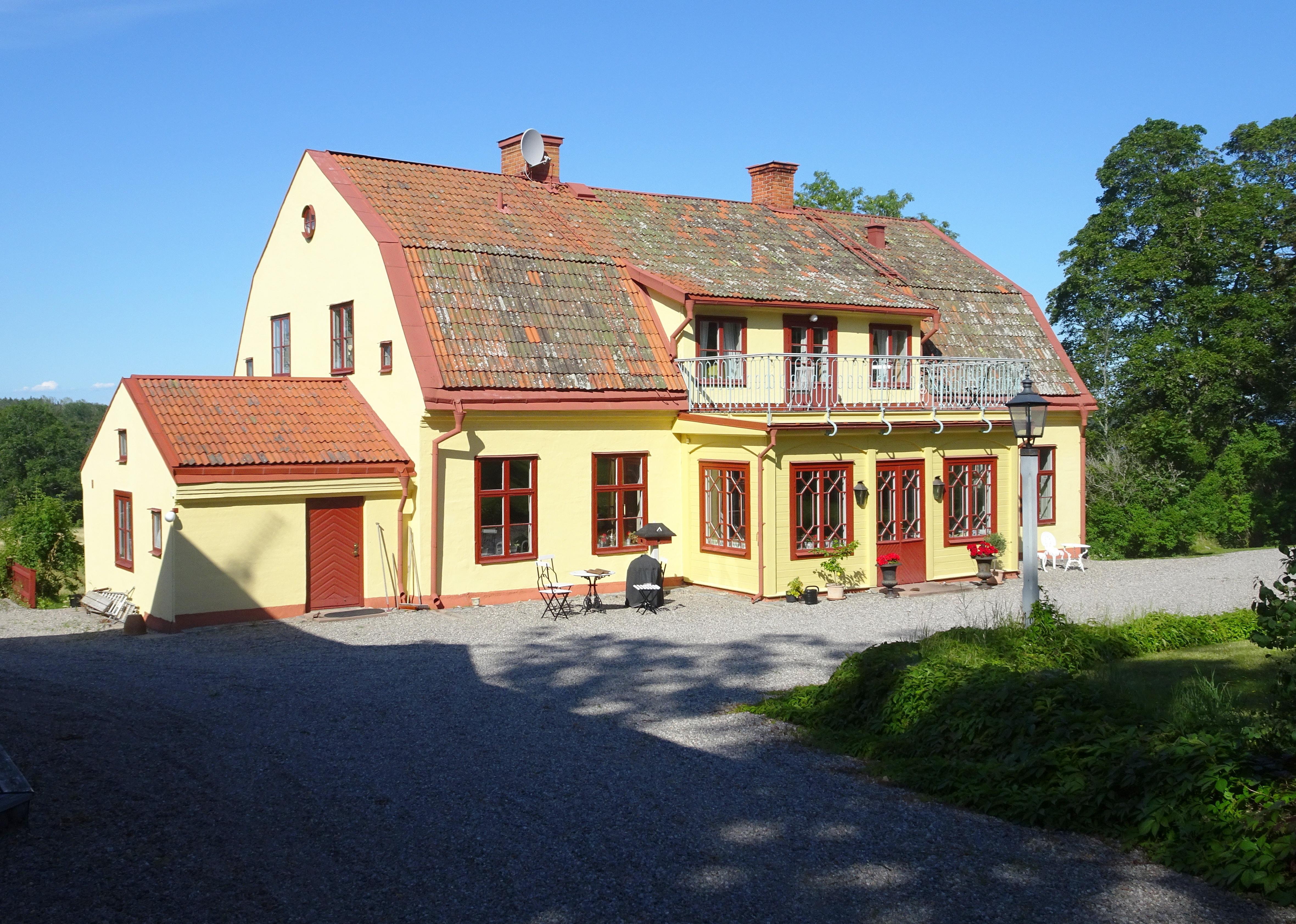 Hedlanda herrgård, huvudbyggnad